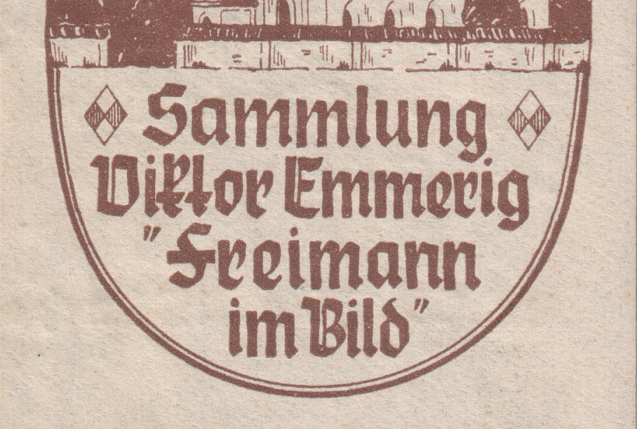 Sammlung Viktor Emmerig, 'Freimann im Bild'. (Exlibris). Untere Hälfte des Exlibris. Die obere Hälfte bildet die Heilig-Kreuz-Kirche in Fröttmaning, München ab (unsigniert). Die Maße des Ovals sind Breite: 40 mm, Höhe: 53. mm. Das Exlibris befindet sich in :Bayerisches Handwerk in seinen alten Zunftordnungen. Diverse Autoren. Herausgeber W. Zilz. Heimatbücher-Verlag Müller & Königer, München. Undatiert.